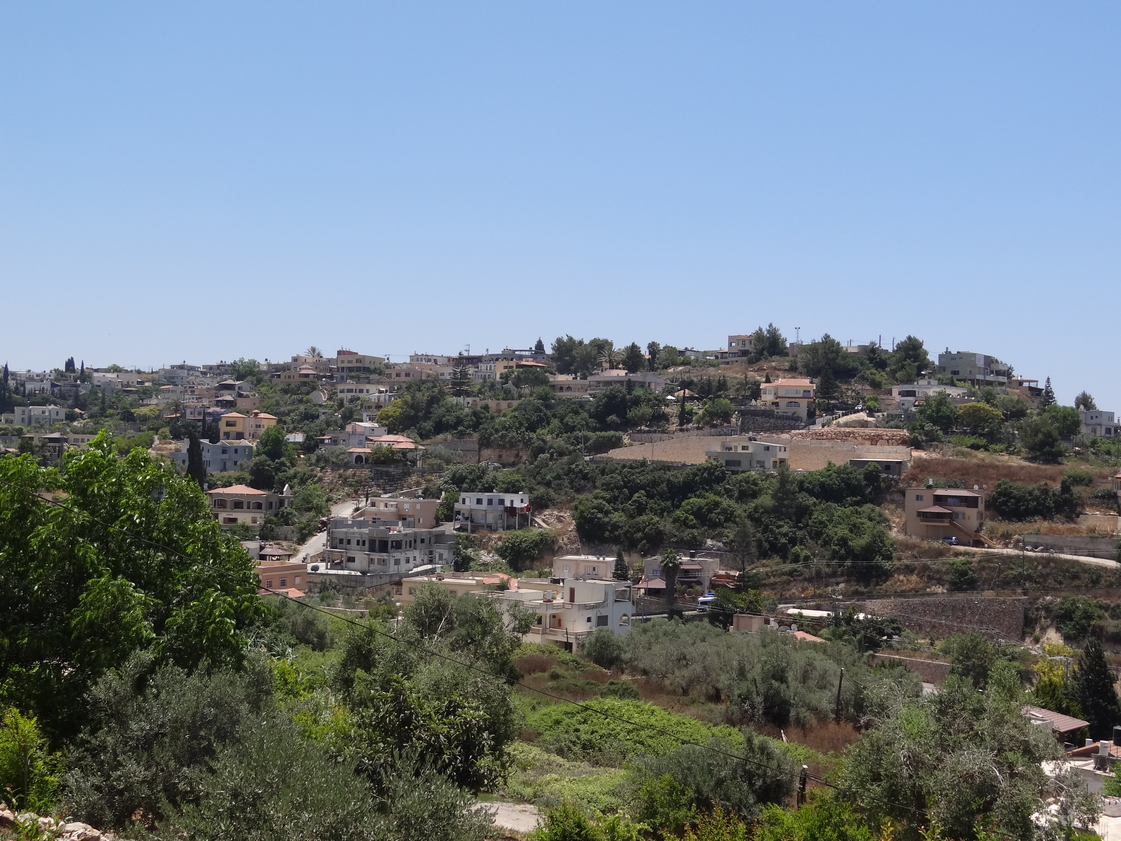 . תצפית מבית אוליפנט על בתי דאלית אל-כרמל